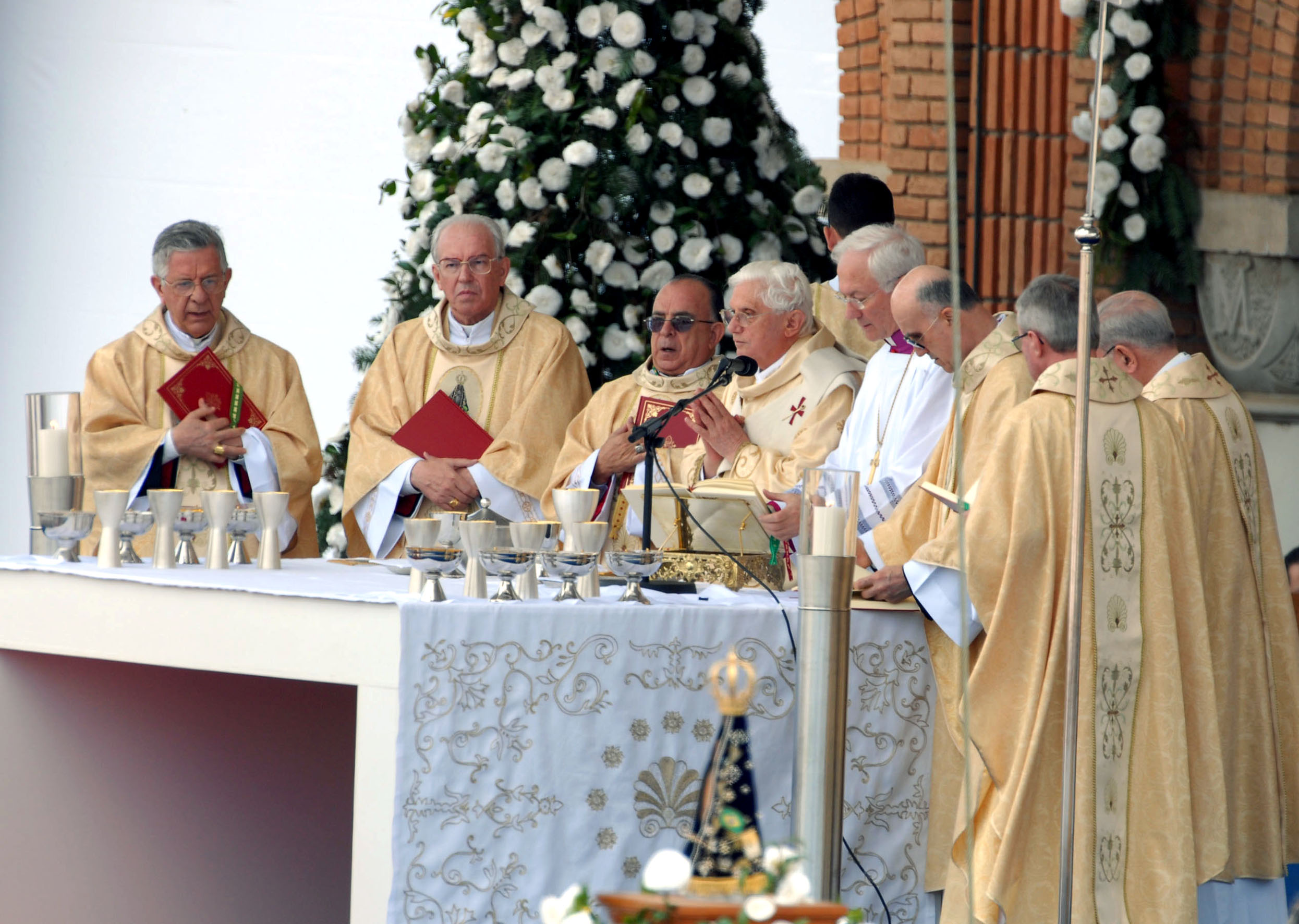 Papa Bento XVI durante missa na Basílica de Nossa Senhora Aparecida, no interior do estado de São Paulo, Brasil.